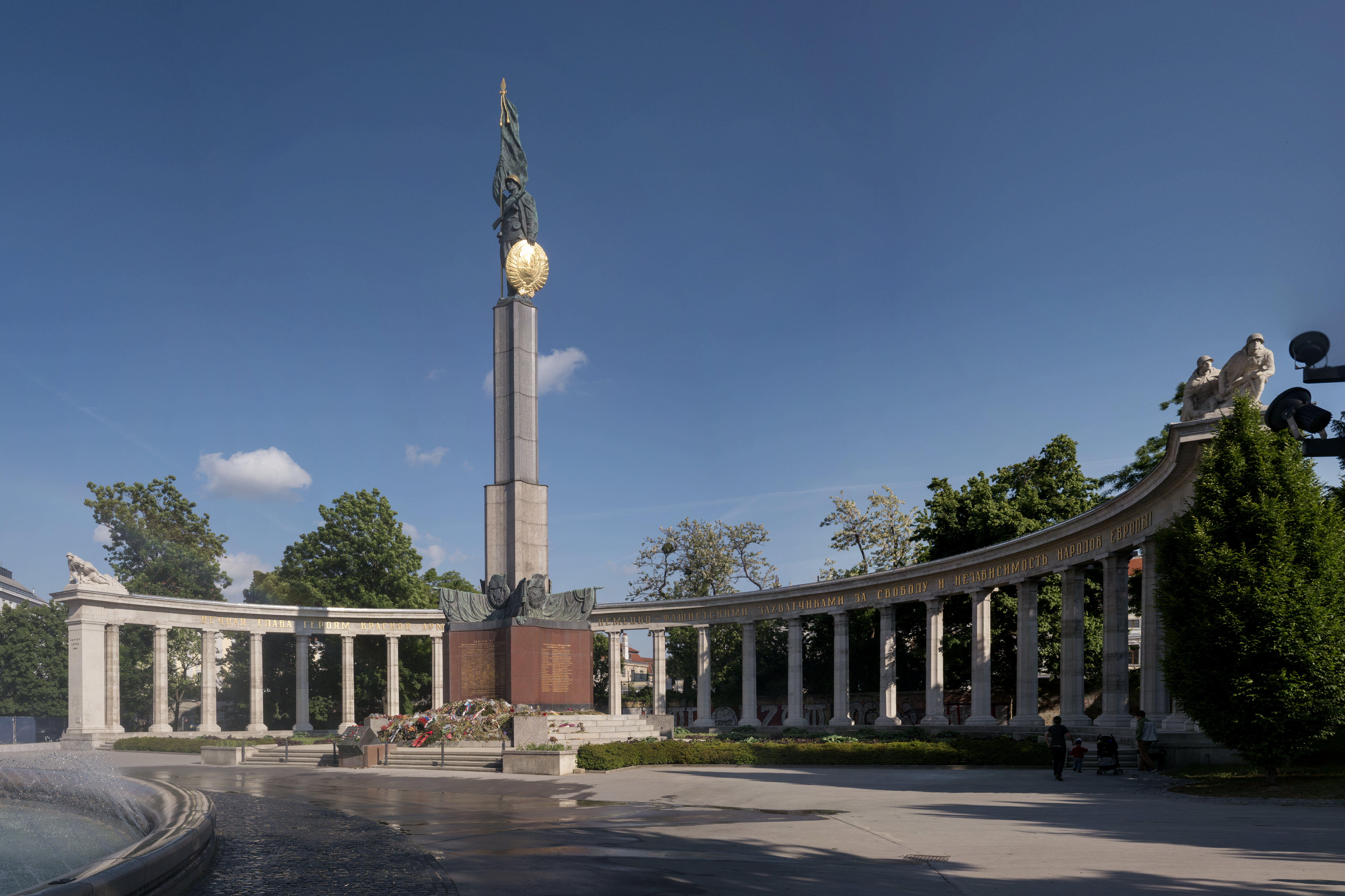 Schwarzenbergplatz Heldendenkmal